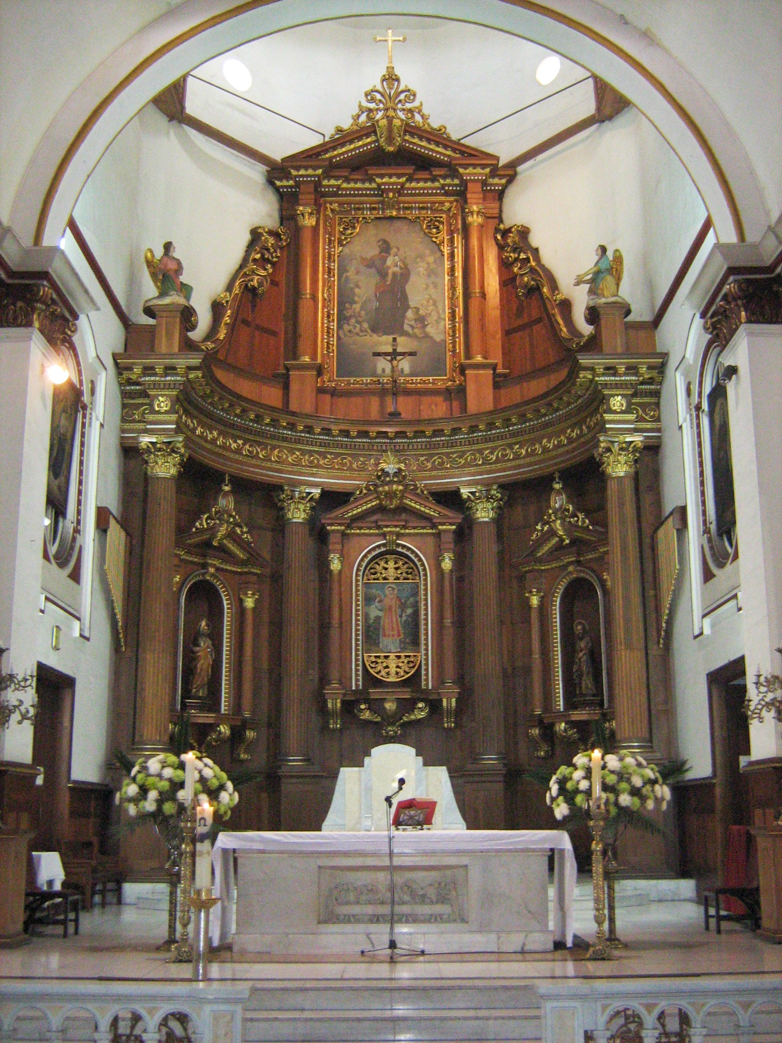 Iglesia San José, en la zona céntrica de Medellín, Colombia.